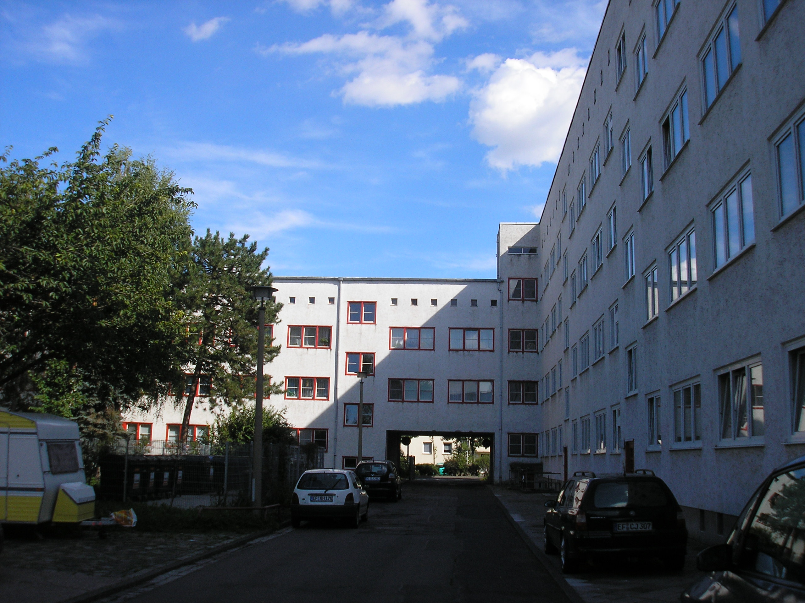 Der Innenhof der Wohnanlage Hansablock von 1930 in Erfurt.